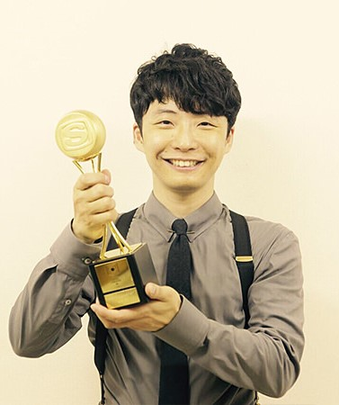 星野源。2016年6月5日公開。